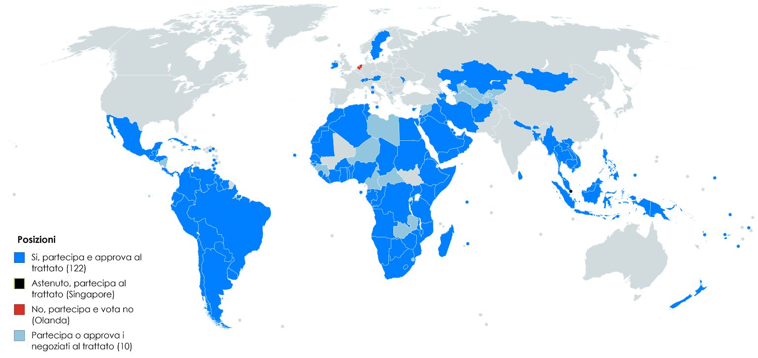 Trattato per la proibizione delle armi nucleari, il voto finale e le posizioni a favore all'Assemblea Generale della Nazioni Unite